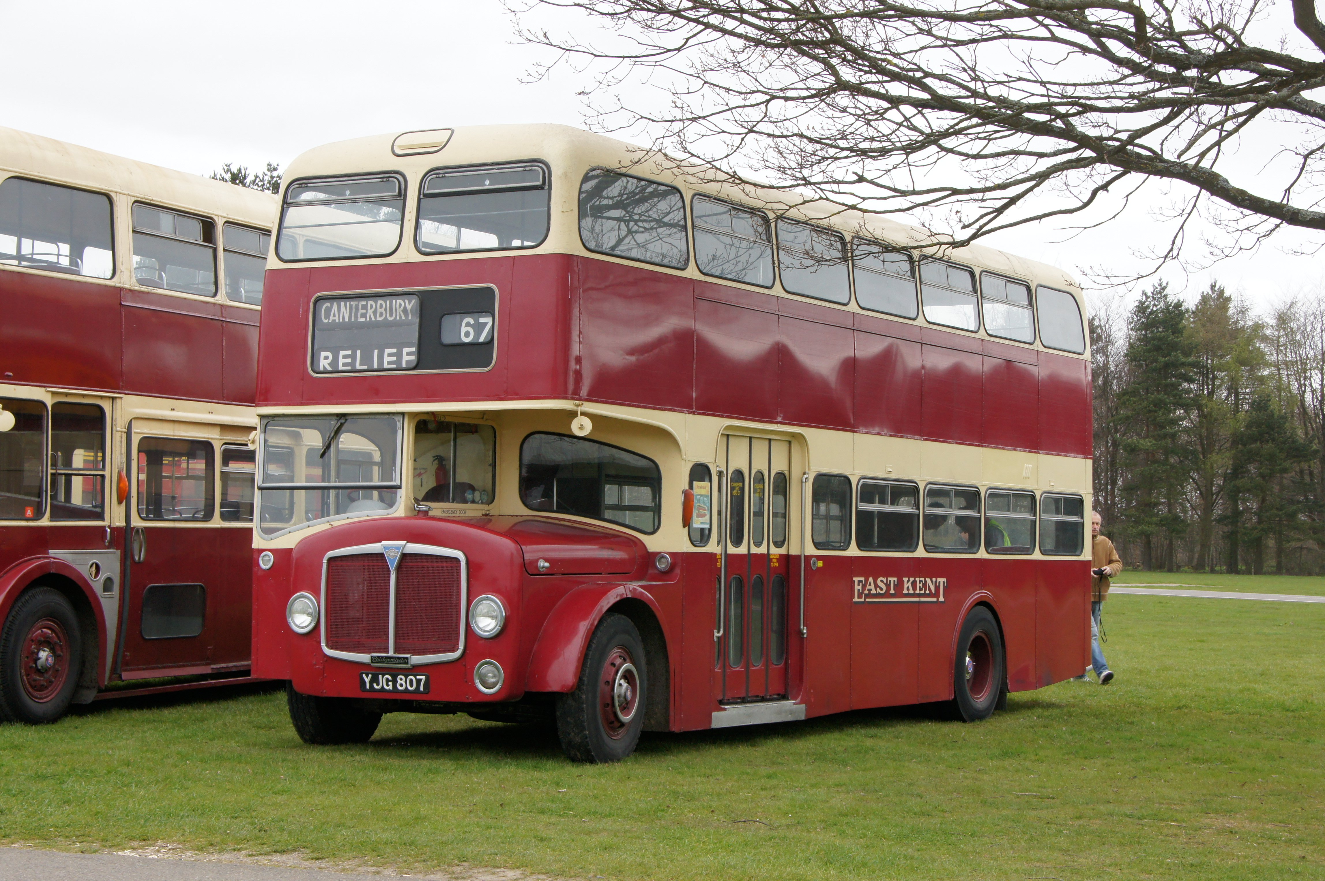 YJG807-1 310312 CPS